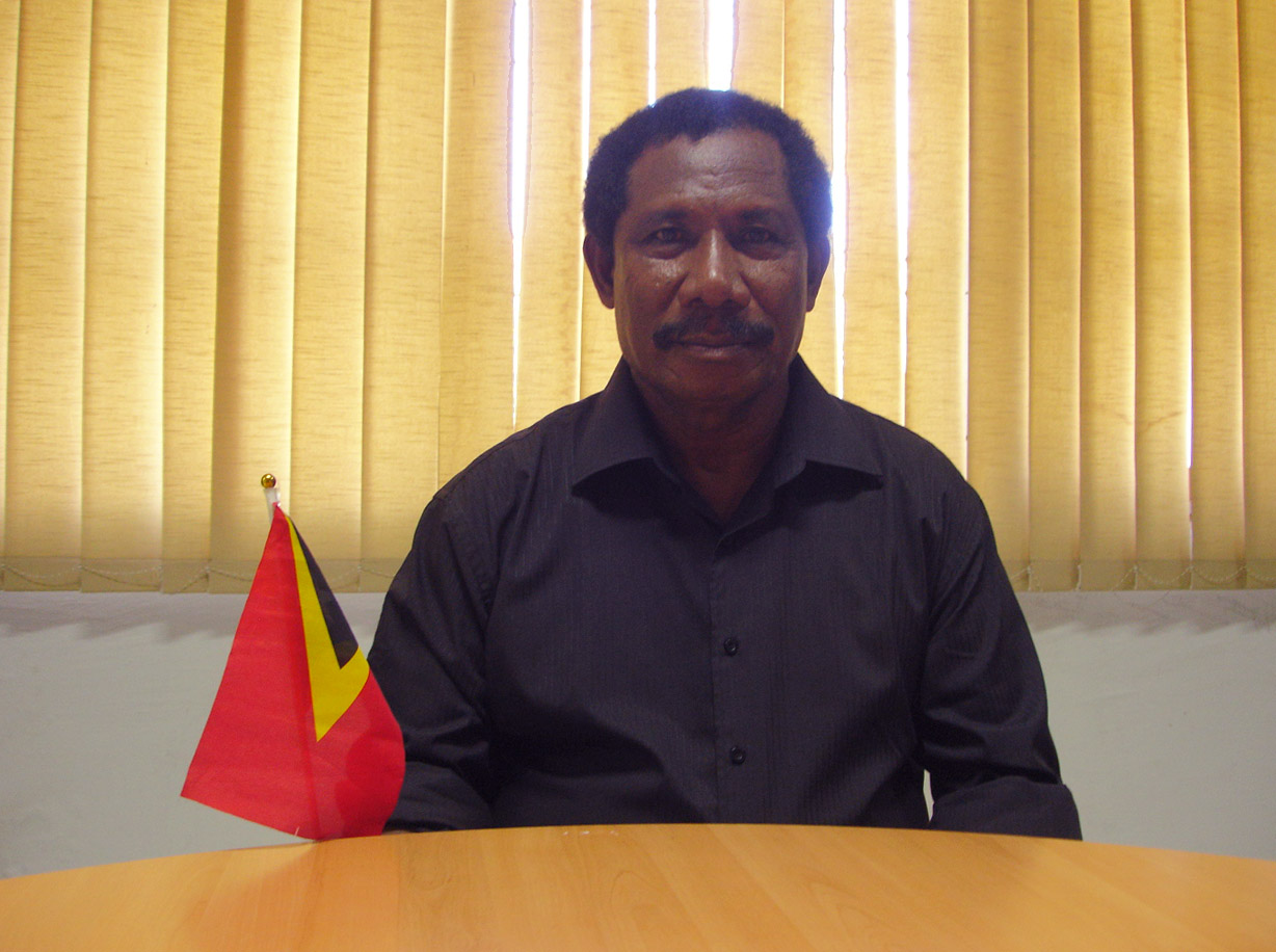 António Soares, Administrator des Subdistrikts Manatuto